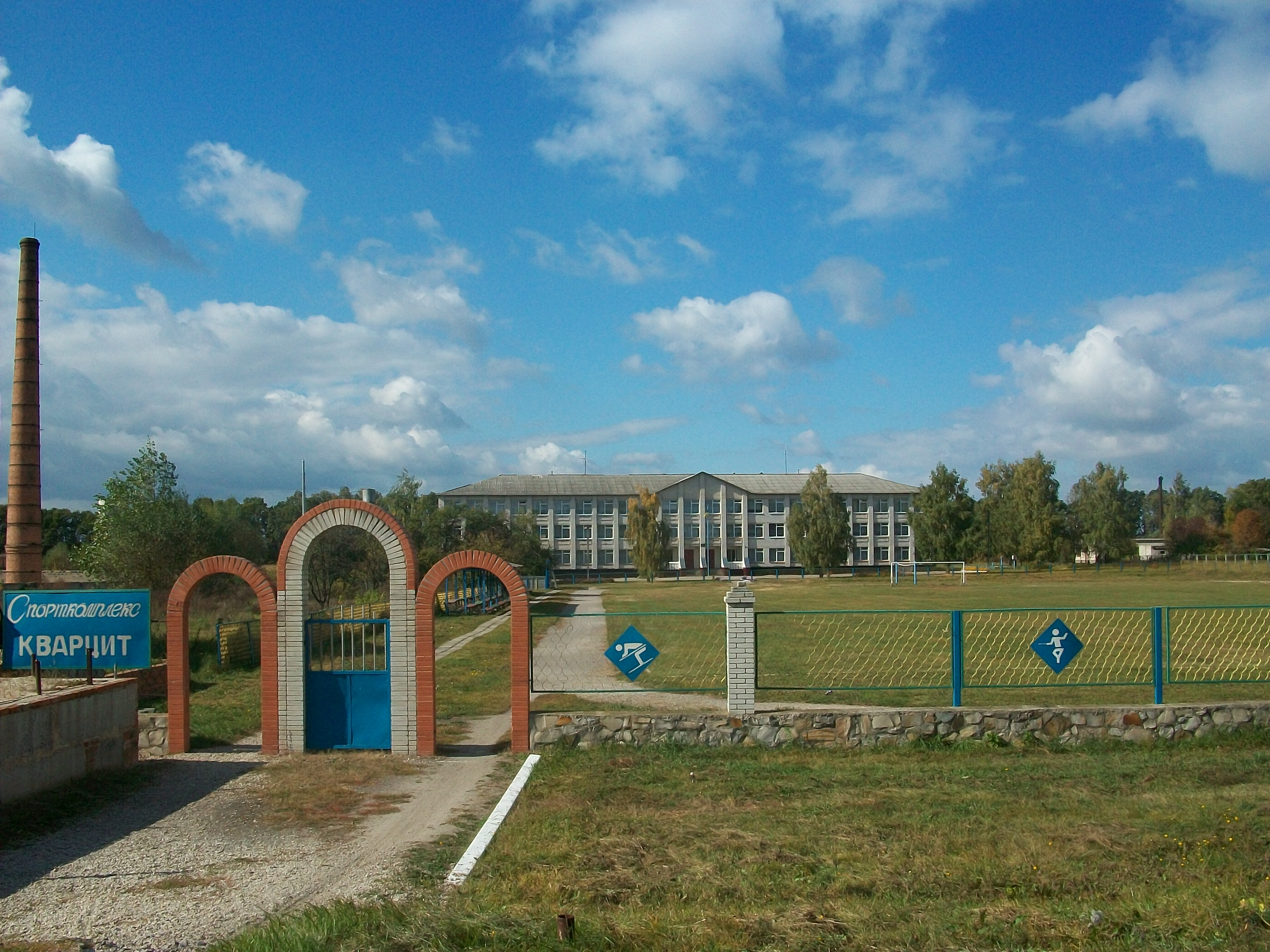 Баничи